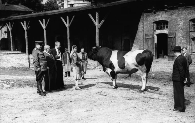 Großbeeren, Übergabe des Gutes in deutsche Hände ADN-ZB-Heilig Übergabe des in sowjetischer Verwaltung befindlichen Tierzuchtgutes Großbeeren im Kreis Teltow durch die SMAD am 27.6.1949 in die Hände der deutschen Verwaltungsorgane der Sowjetischen Besatzungszone. UBz.: die Besichtigung des Gutes durch die sowjetische und die deutsche Kommission: der Stolz des Gutes - der Zuchtbulle. 3499-49